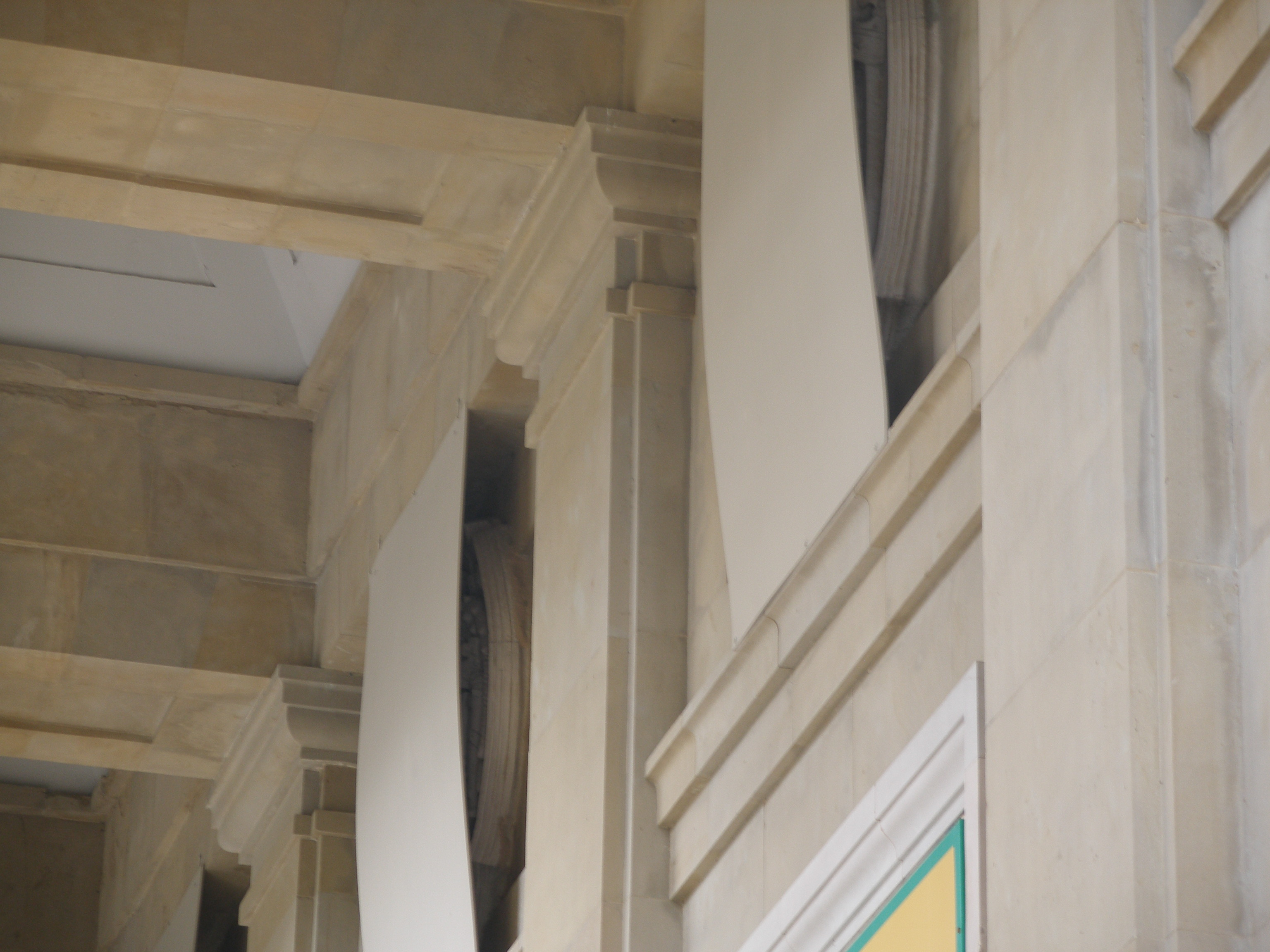 detalle monumento a los Caidos (Pamplona)